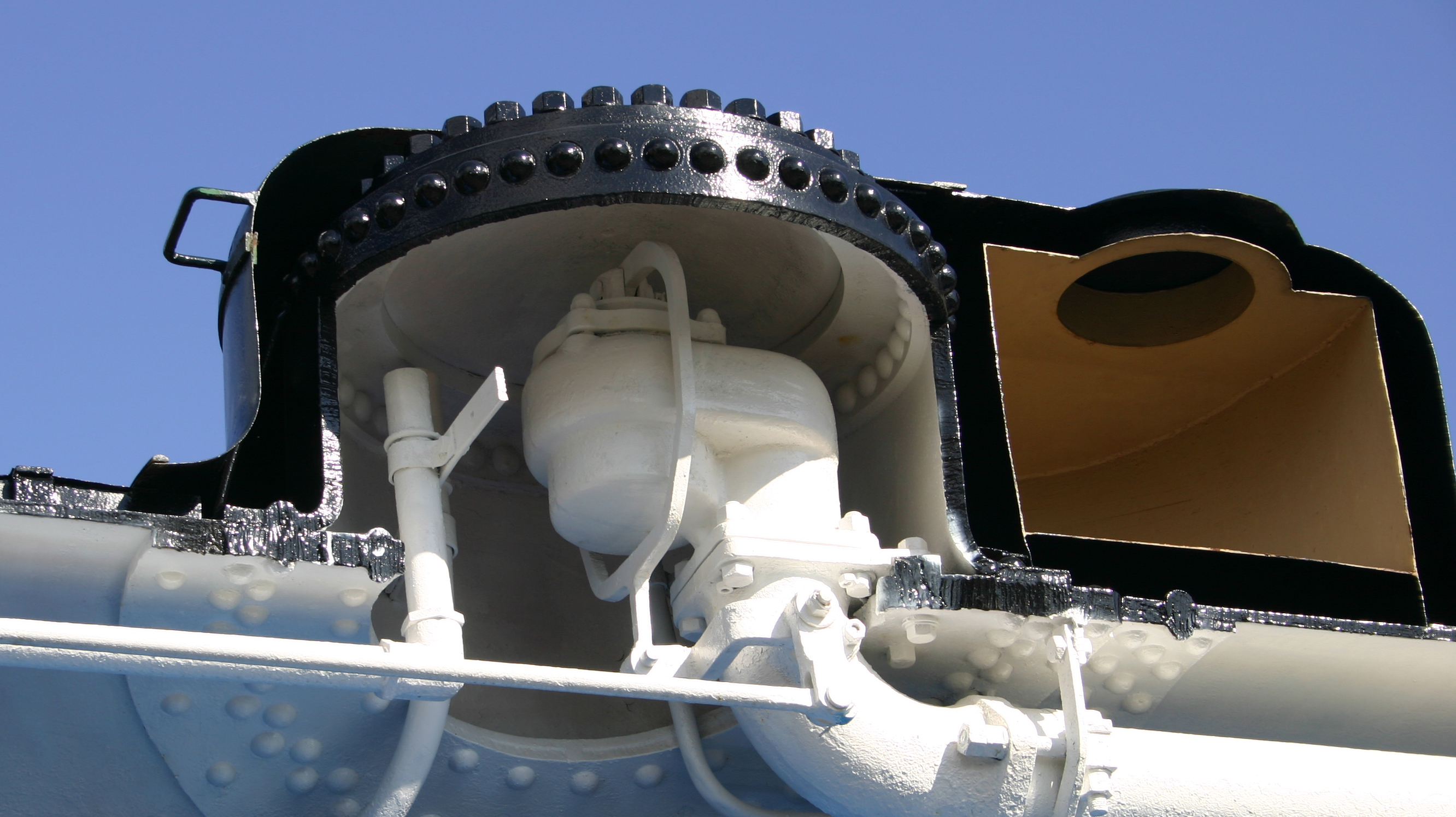 Hr1-höyryveturin 1003 halkaistu höyrykupu Haapamäen höyryveturipuistossa